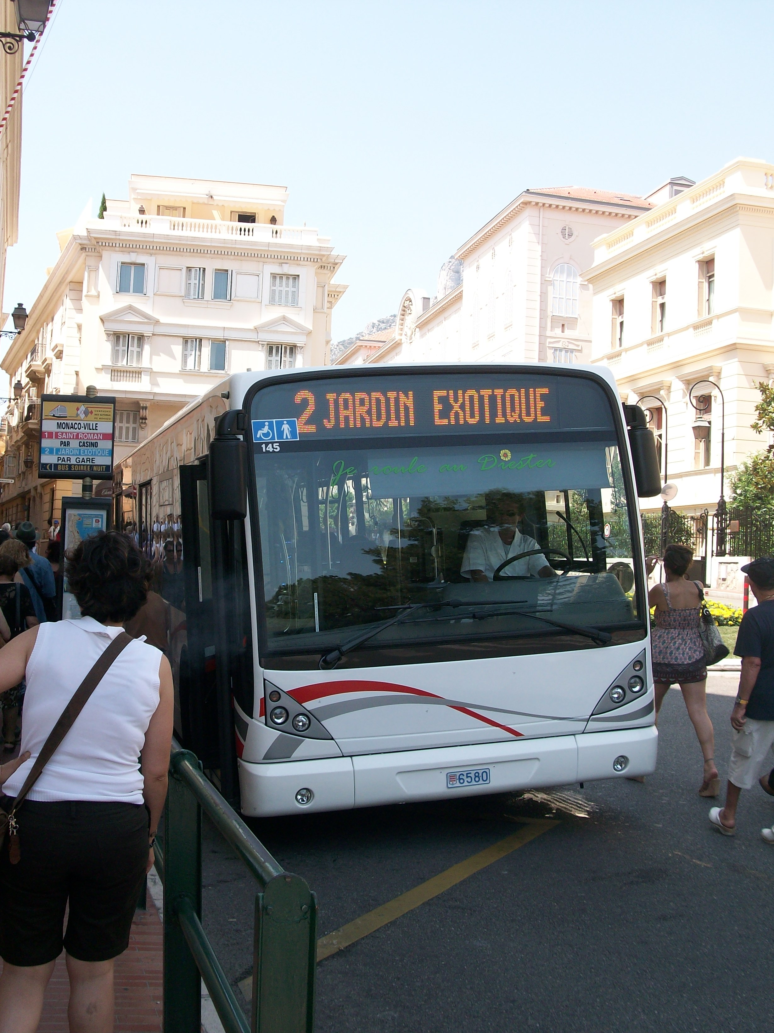 Van Hool NewA330, CAM, Monaco